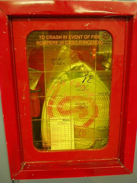 Unbrauchbare Brandschutzeinrichtung am Flughafen Rom-Ciampino